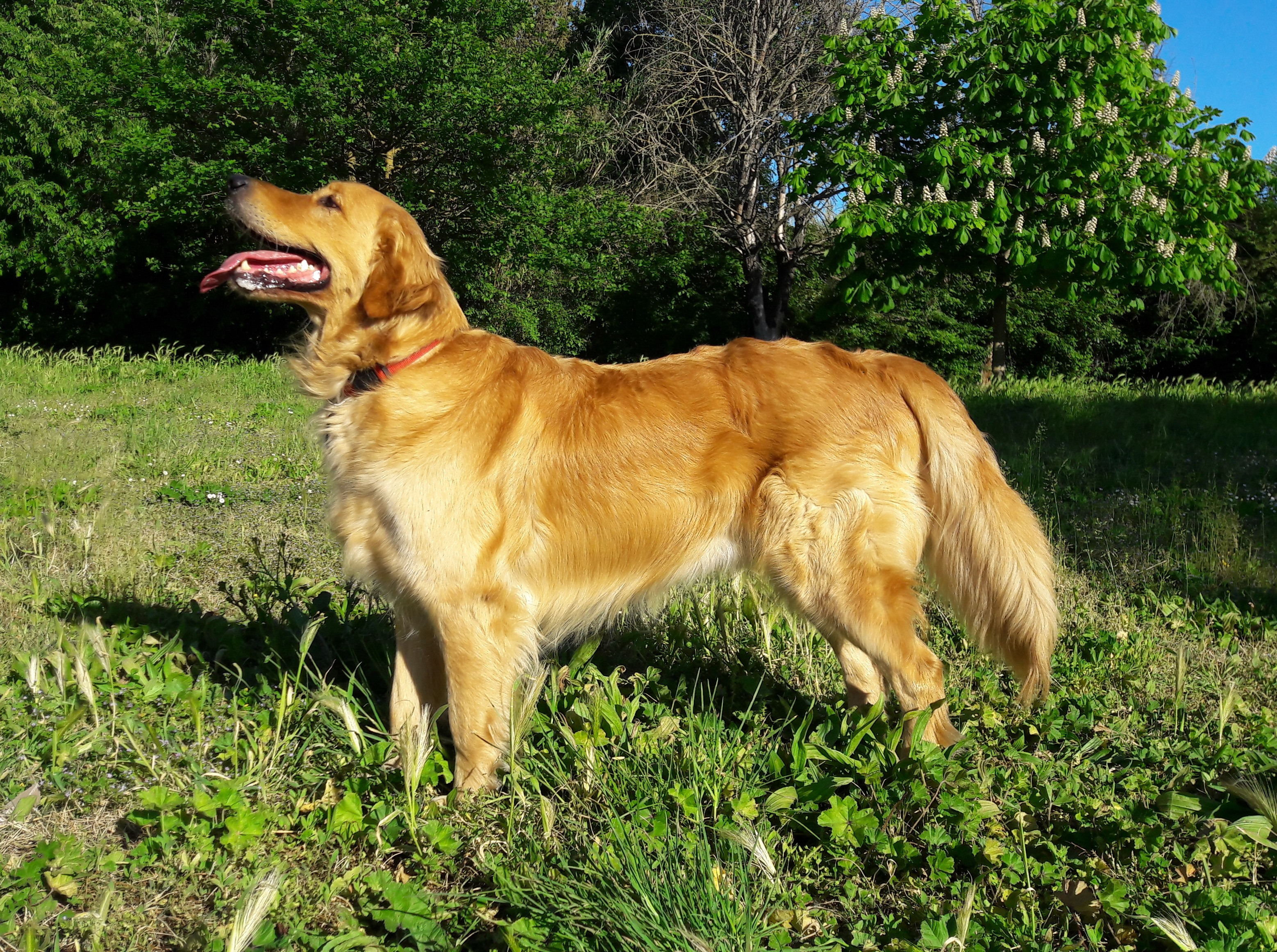 Golden retriever (visto di lato)